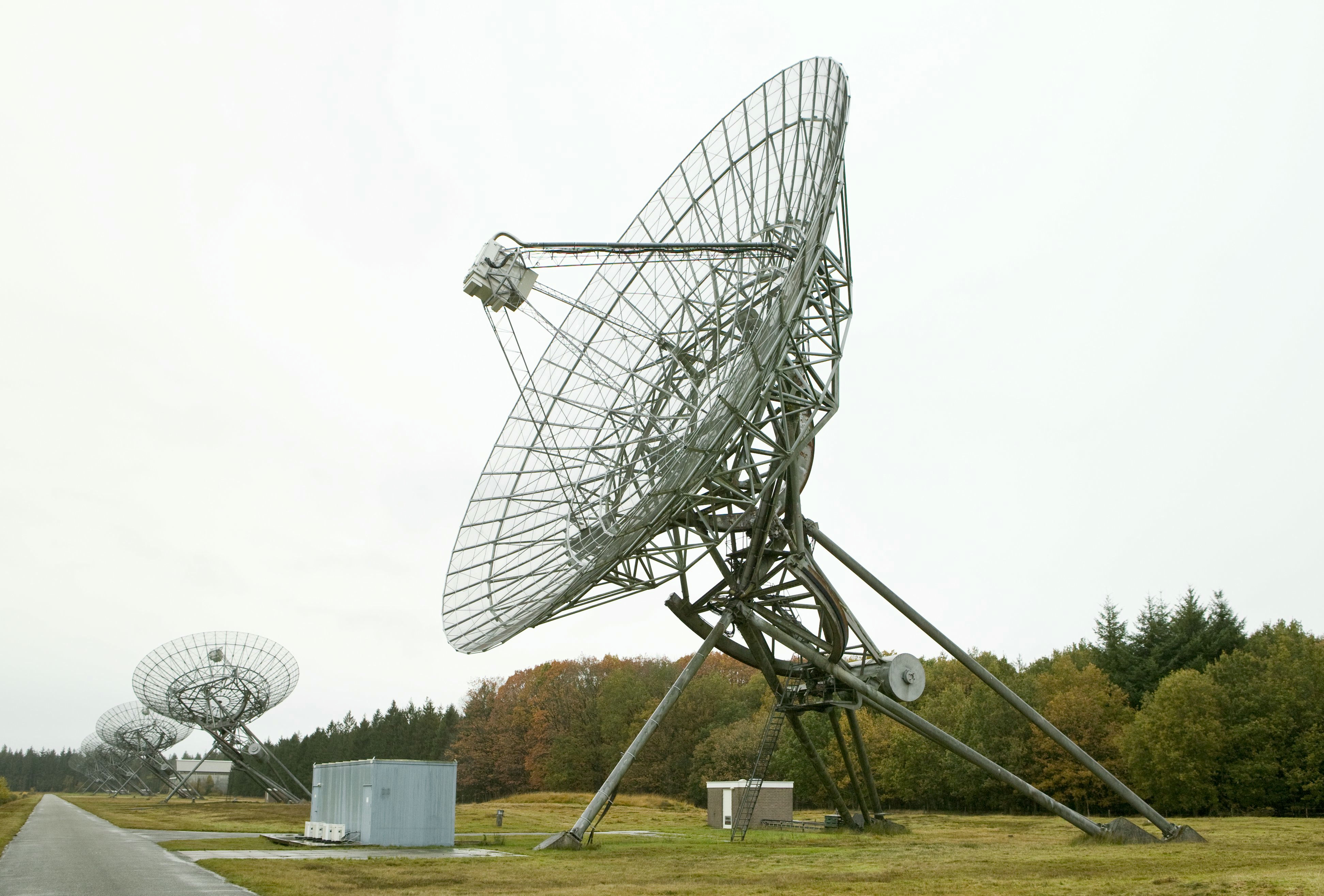 Kamp Westerbork: Overzicht radiotelescoop op voormalig kamp Westerbork (opmerking: Gefotografeerd voor fotofolie nieuwbouw)